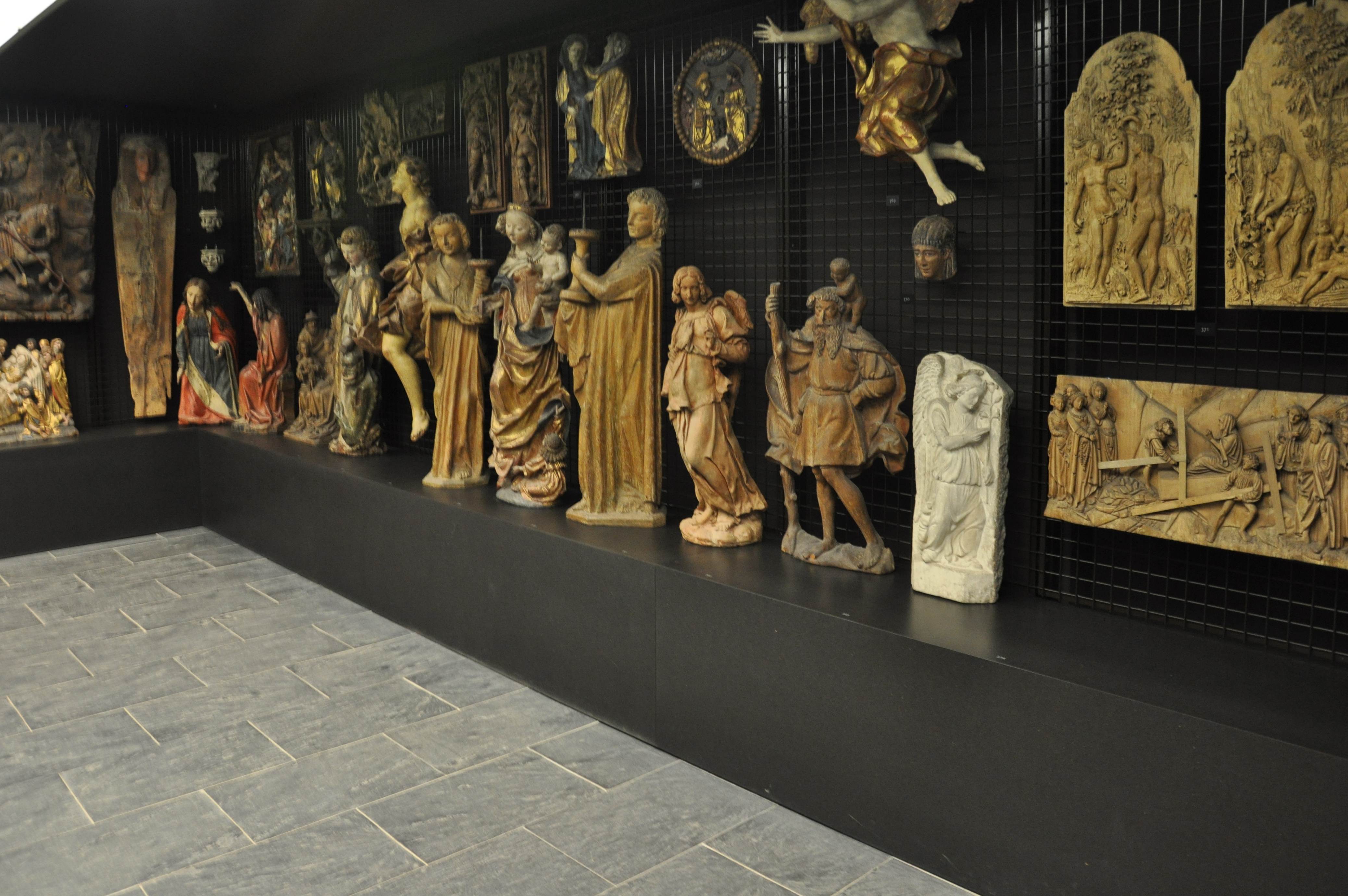 Schaudepot, Liebieghaus, Frankfurt am Main